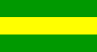 Drapeau de la principauté de Baoni This work is in the public domain in India because its term of copyright has expired. The Indian Copyright Act applies in India, to works first published in India. According to The Indian Copyright Act, 1957 (Chapter V Section 25), Anonymous works, photographs, cinematographic works, sound recordings, government works, and works of corporate authorship or of international organizations enter the public domain 60 years after the date on which they were first published, counted from the beginning of the following calendar year (ie. as of 2015, works published prior to 1 January 1955 are considered public domain). Posthumous works (other than those above) enter the public domain after 60 years from publication date. Any other kind of work enters the public domain 60 years after the author's death. Text of laws, judicial opinions, and other government reports are free from copyright. Photographs created before 1958 are in the public domain 50 years after creation, as per the Copyright Act 1911. This file may not be in the public domain outside India. The creator and year of publication are essential information and must be provided. See Wikipedia:Public domain and Wikipedia:Copyrights for more details. This image shows a flag, a coat of arms, a seal or some other official insignia. The use of such symbols is restricted in many countries. These restrictions are independent of the copyright status.